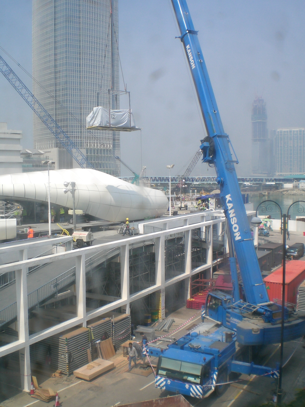 愛丁堡廣場停車場工程起重機